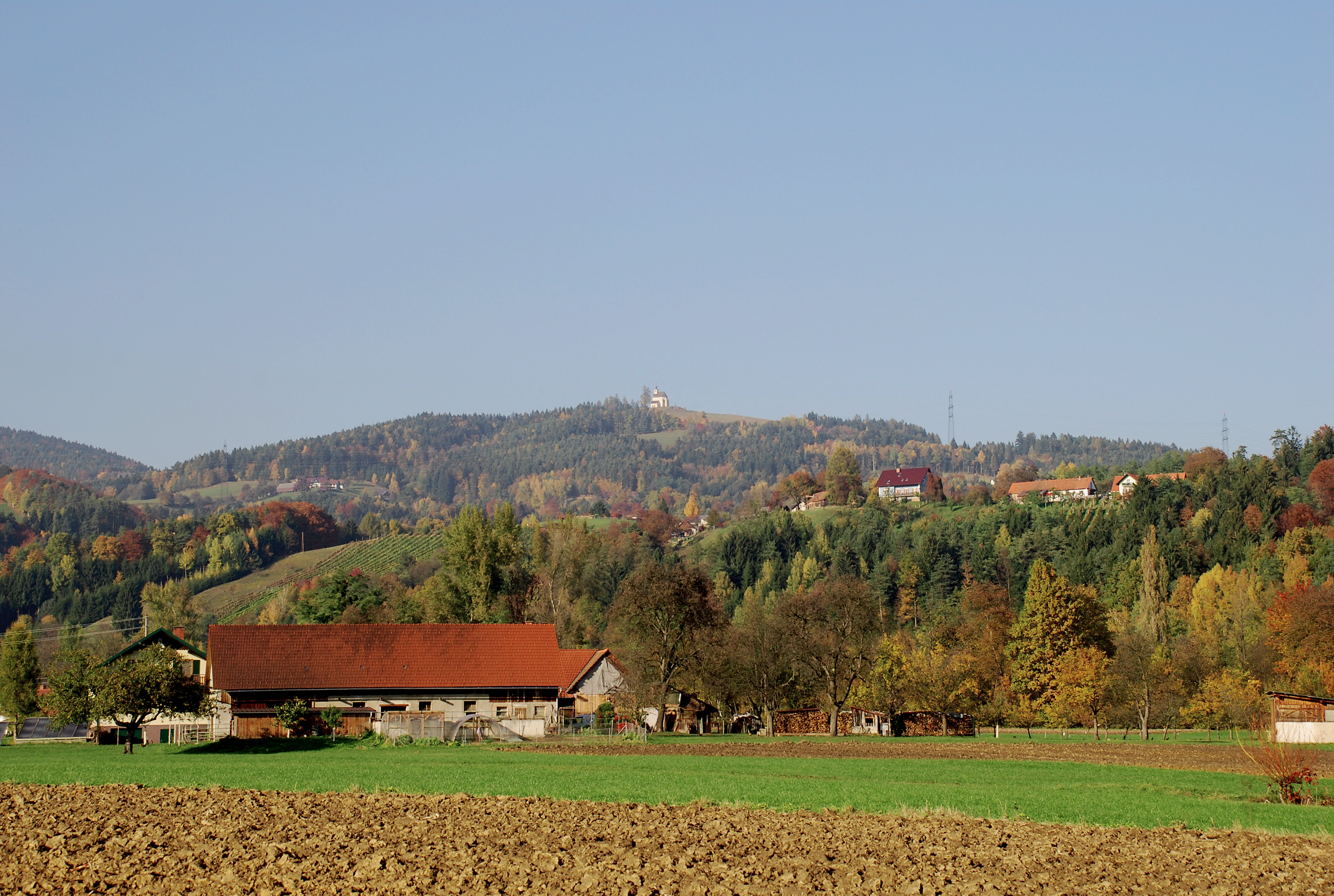 Sankt Wolfgang-Kirche in Hollenegg, Bezirk Deutschlandsberg, Steiermark Object location46° 47′ 39.12″ N, 15° 11′ 42.63″ E The above coordinates are missing from linked Wikidata item M17271101. Click here to copy it